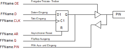 Zeigt die Dot-Extensione bei einem D-Flipflop in einem CPLD